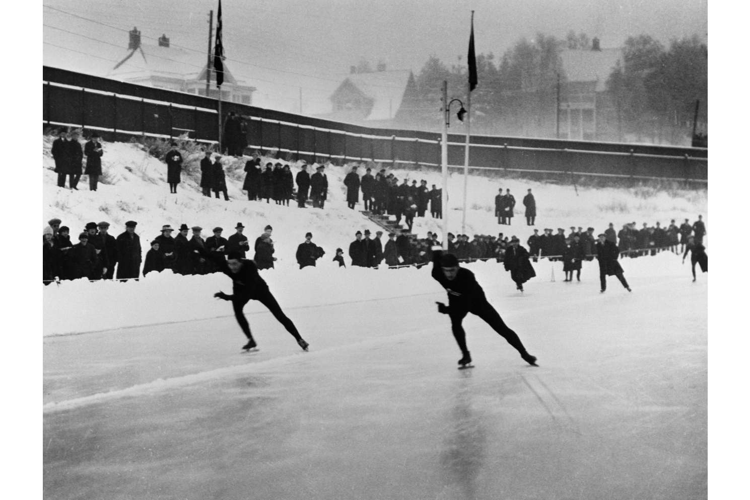 HAMAR STADION, SKØYTELØP, EM. EUROPAMESTERSKAP 1923, START PÅ 10 000 METER MED CLAS THUNBERG, (FINLAND) OG JACOB MELNIKOFF, (SOVJET).